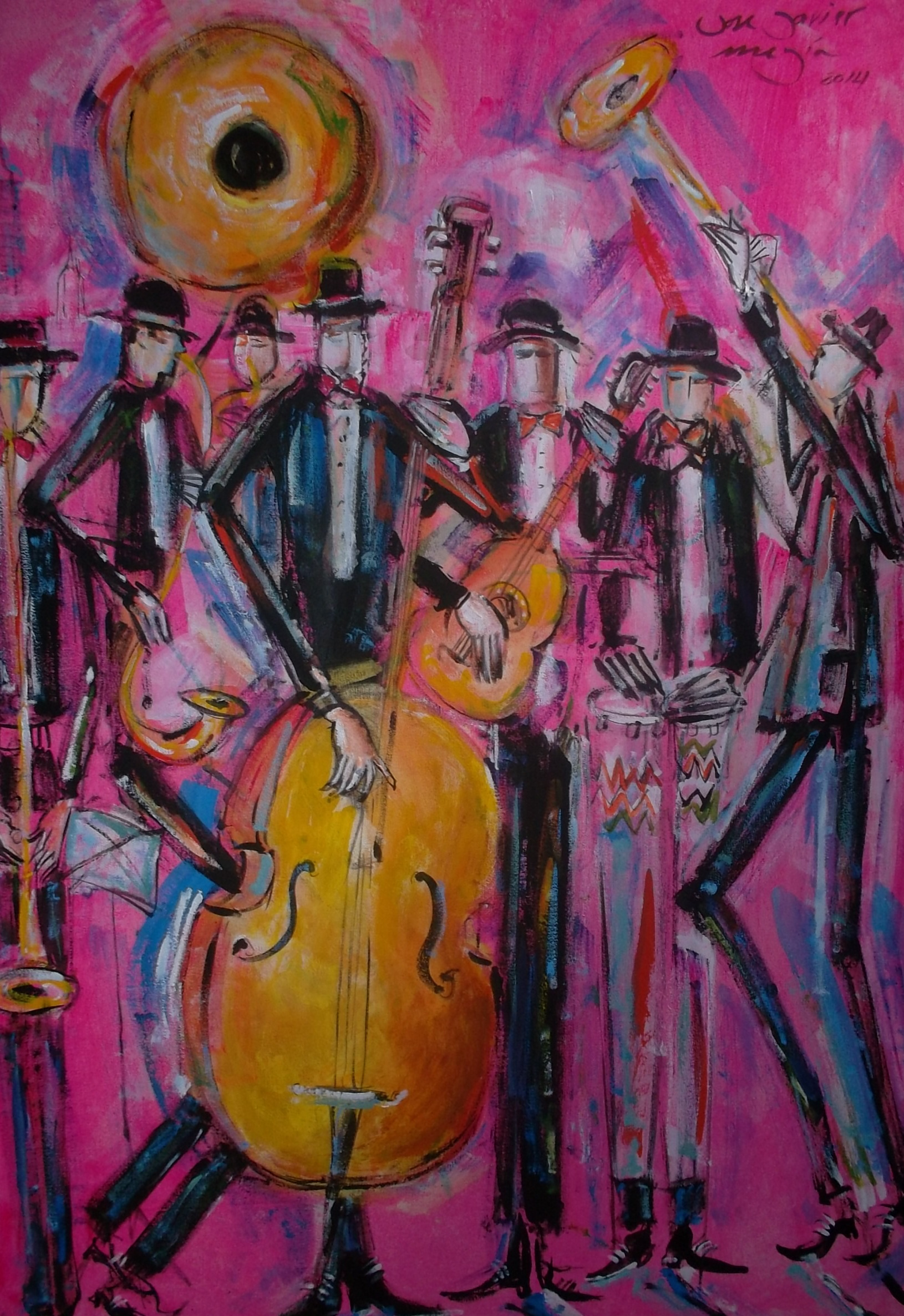 Músicos de Jazz Latino This work has been released into the public domain by its author, yesvari85. This applies worldwide. In some countries this may not be legally possible; if so: yesvari85 grants anyone the right to use this work for any purpose, without any conditions, unless such conditions are required by law.